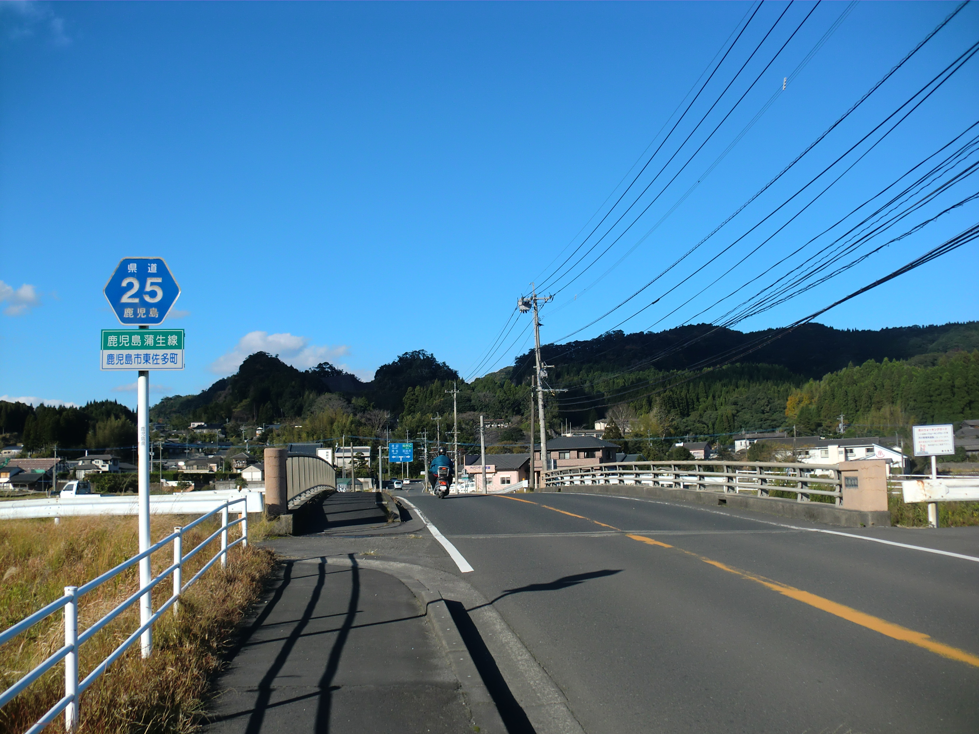 鹿児島県道25号鹿児島蒲生線。鹿児島市東佐多町で撮影